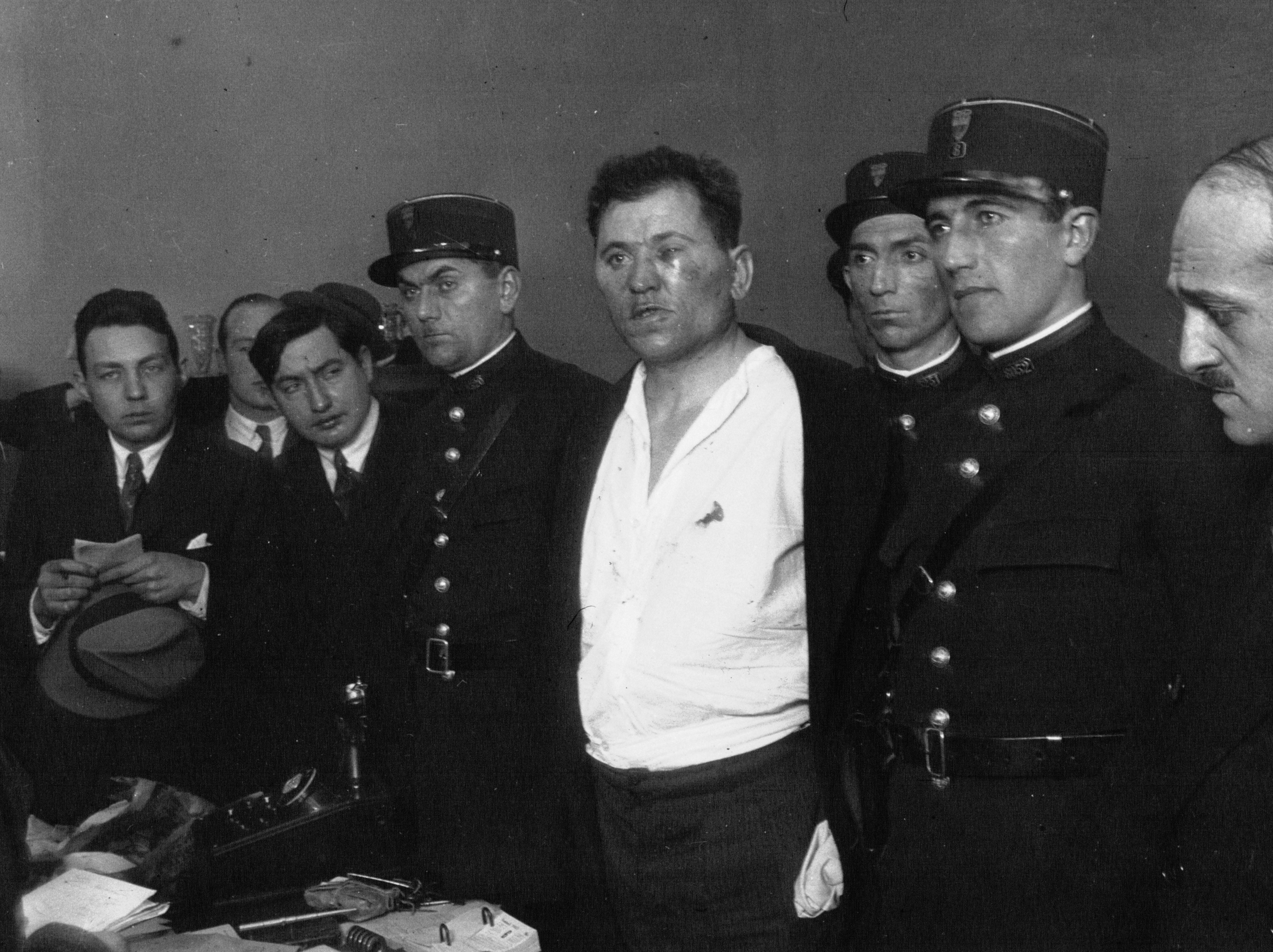 L'assassin du président français Paul Doumer peu après son arrestation.